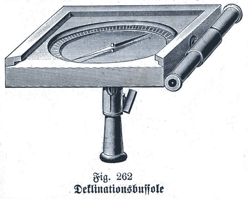 Declinometer